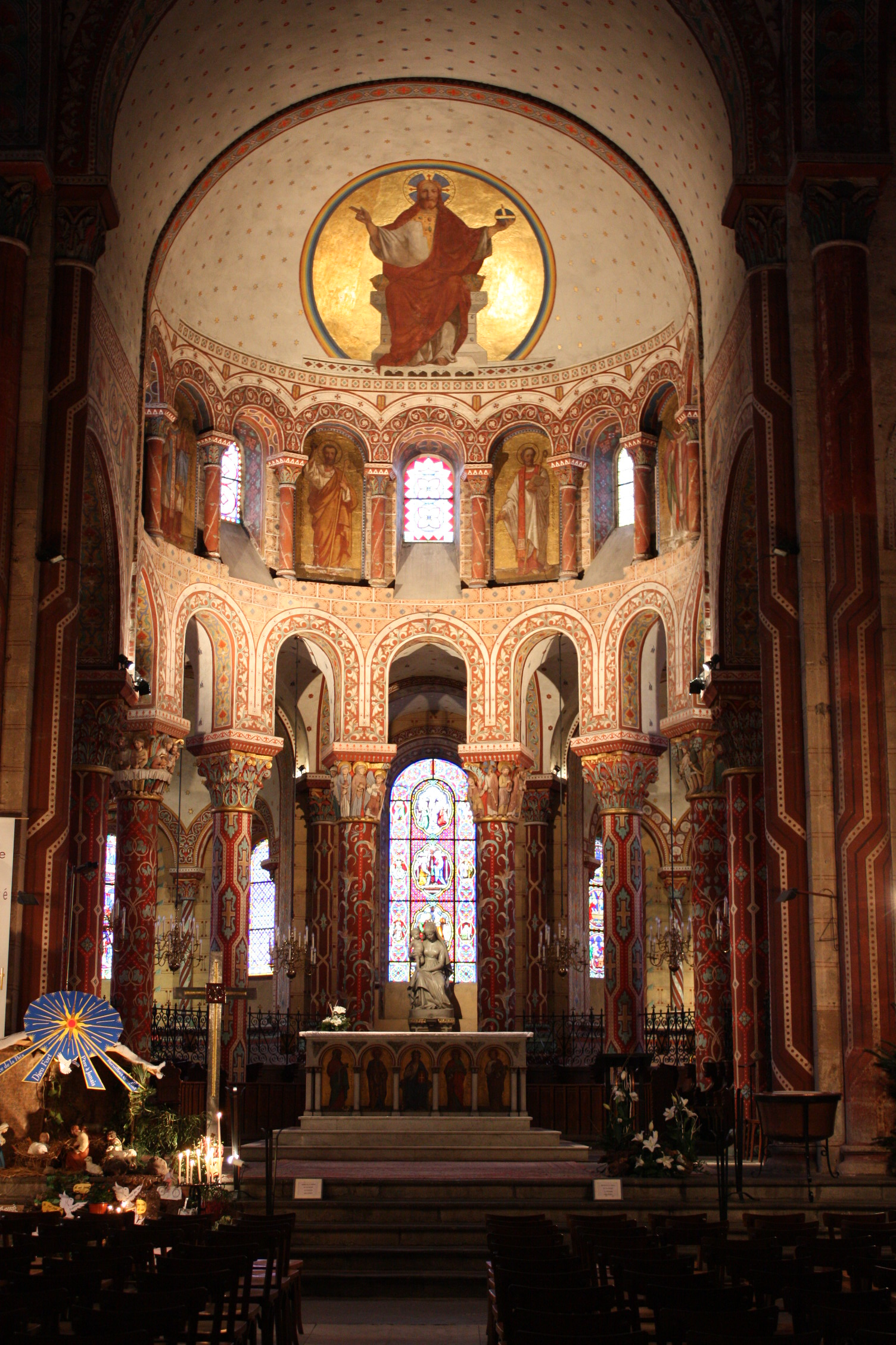 Choeur de l'église abbatiale Saint-Austremoine d'Issoire, vu de la nef.